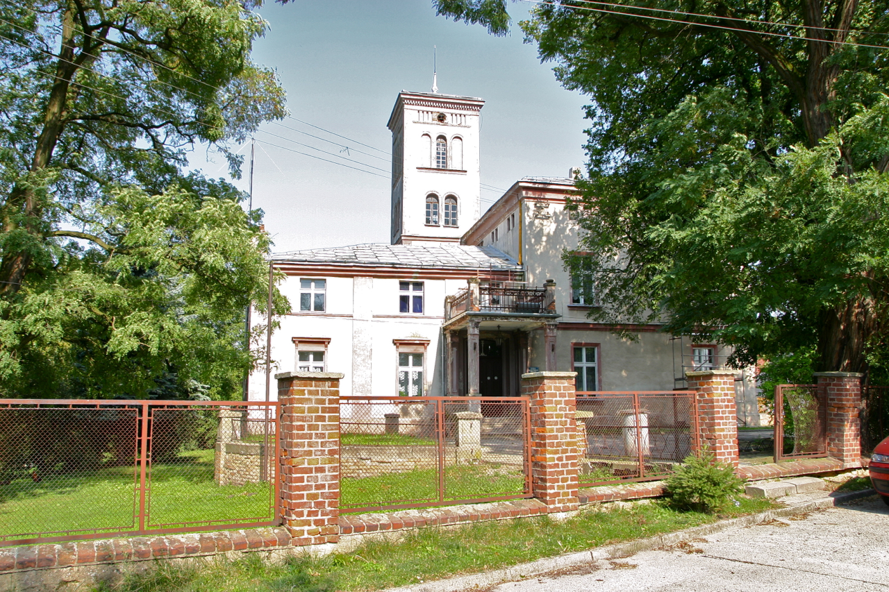 Twardawa – pałac, XIX w.